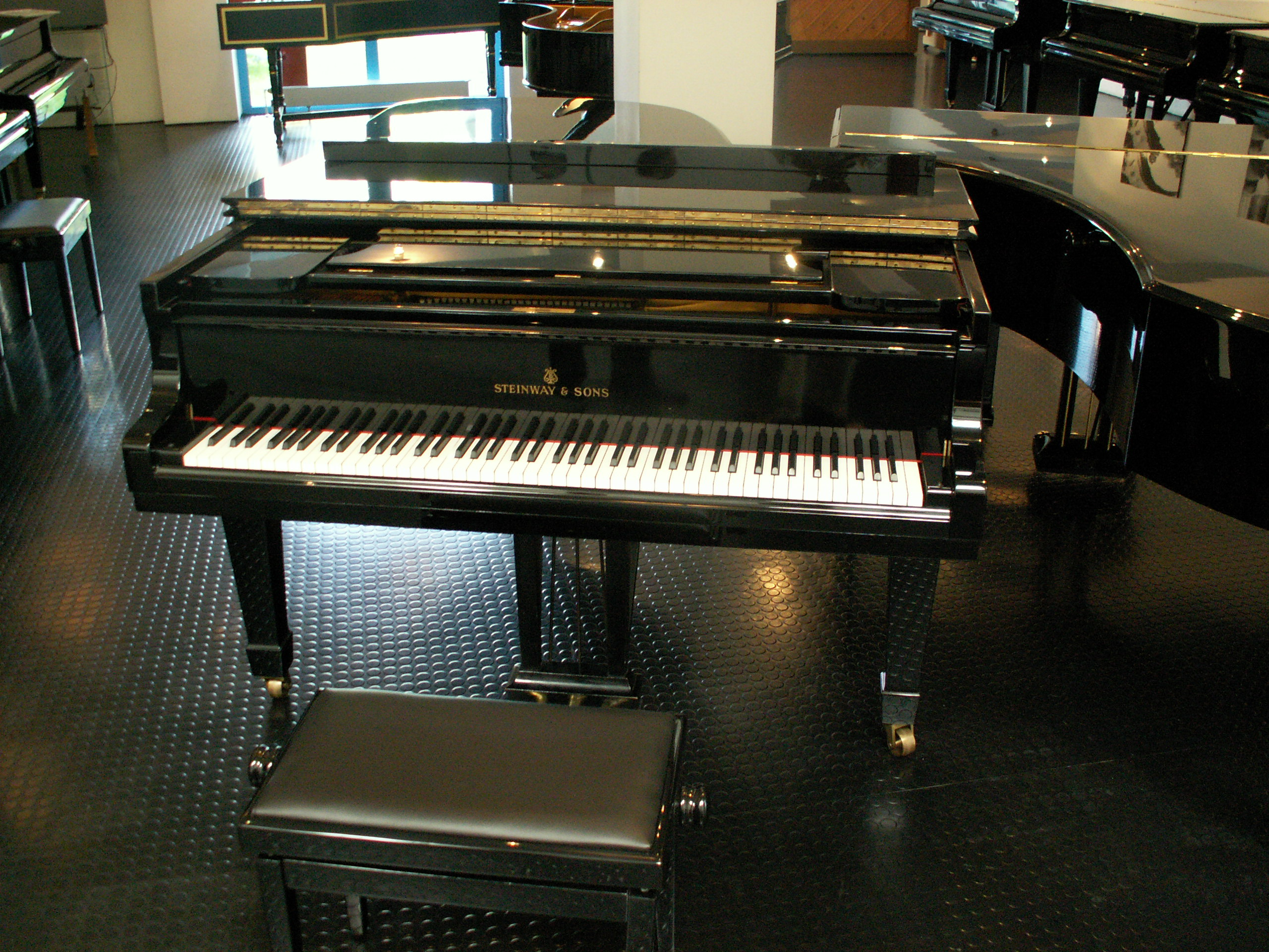 Fortepian marki Steinway & Sons